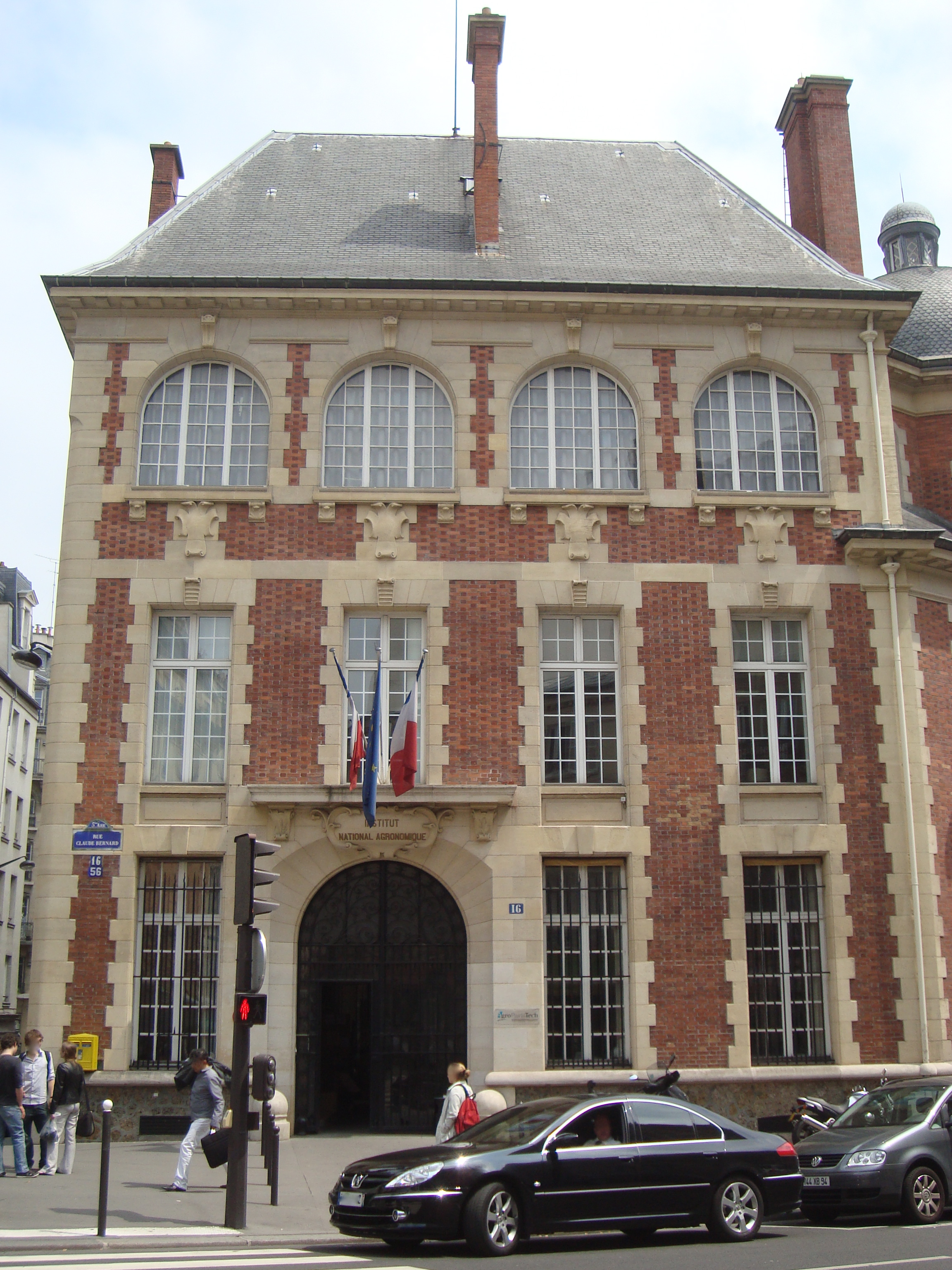 Entrée de l'Institut national d'agronomie, 16 rue Claude-Bernard, à Paris